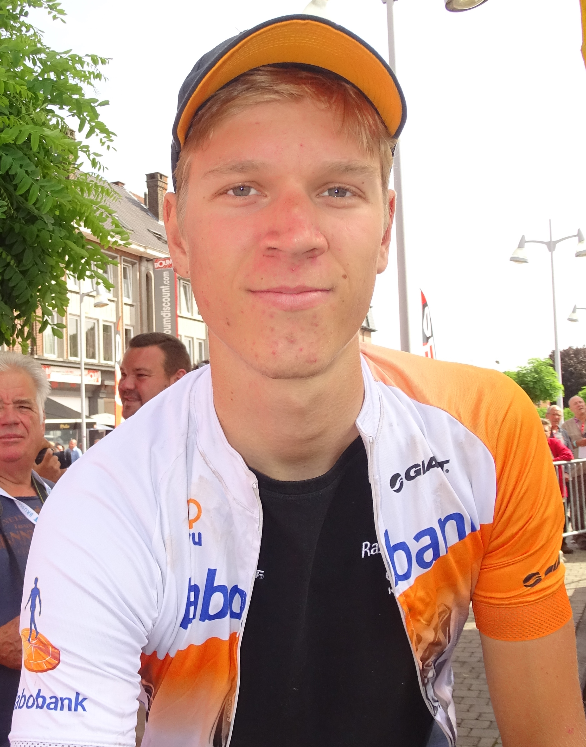 Reportage réalisé le mercredi 22 juillet à l'occasion du départ du Grand Prix Pino Cerami 2015 à Saint-Ghislain, Belgique.